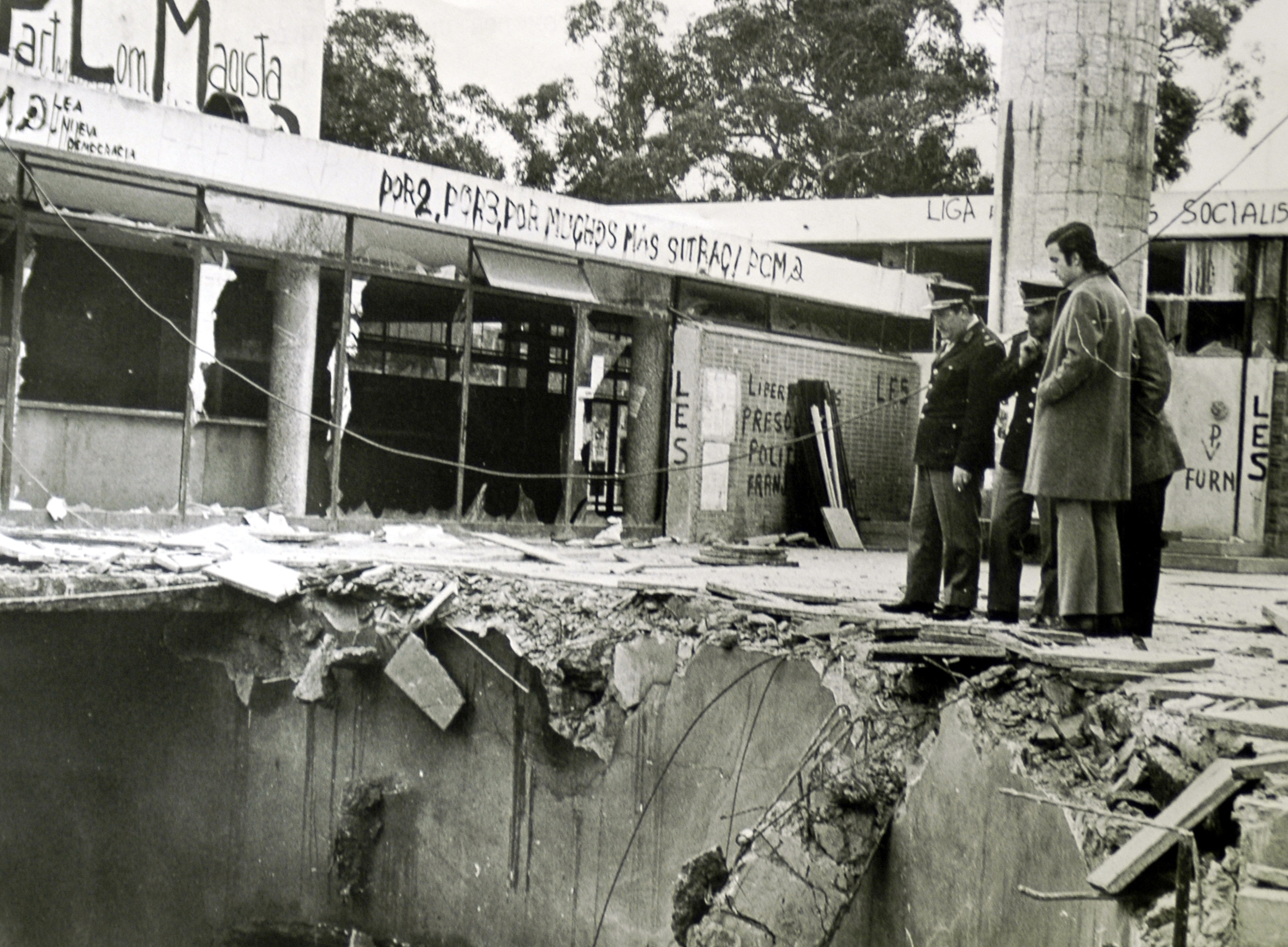 Vista de la destrucción en el Comedor Universitario de la UNLP a causa de un atentado explosivo.